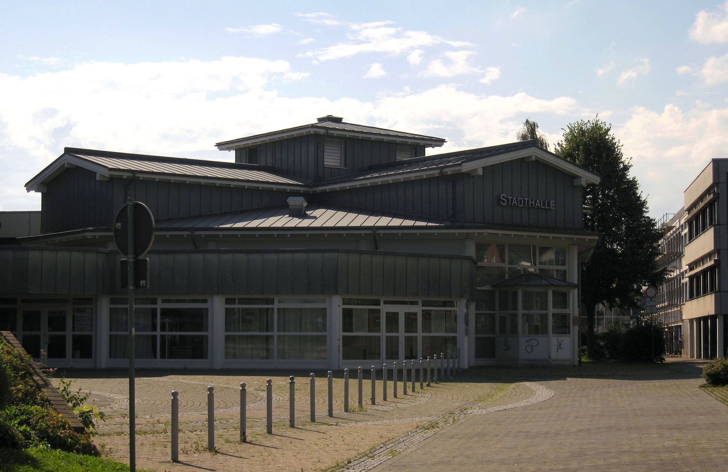 Stadthalle in Kreuztal, Erbstollen 7.